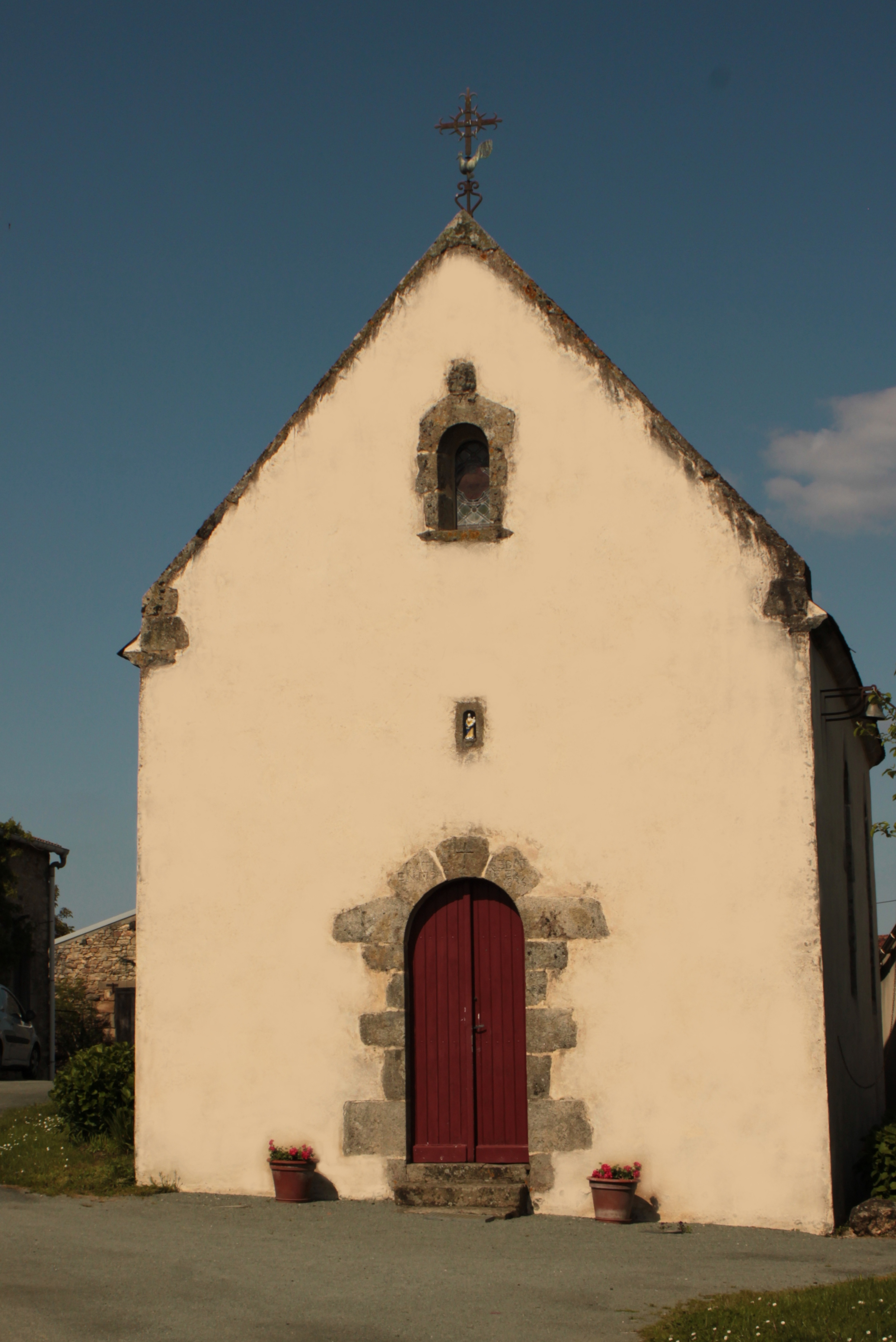 Chapelle de la Tulévrière, dite des Martyrs du Bas-Poitou, Fr-85-Saint-Étienne-du-Bois.